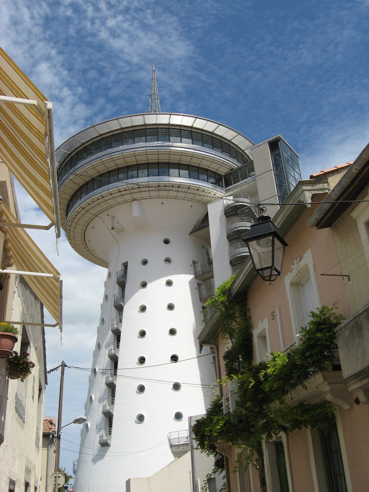 Phare de la Méditerranée, Palavas-les-Flots (France, Hérault)